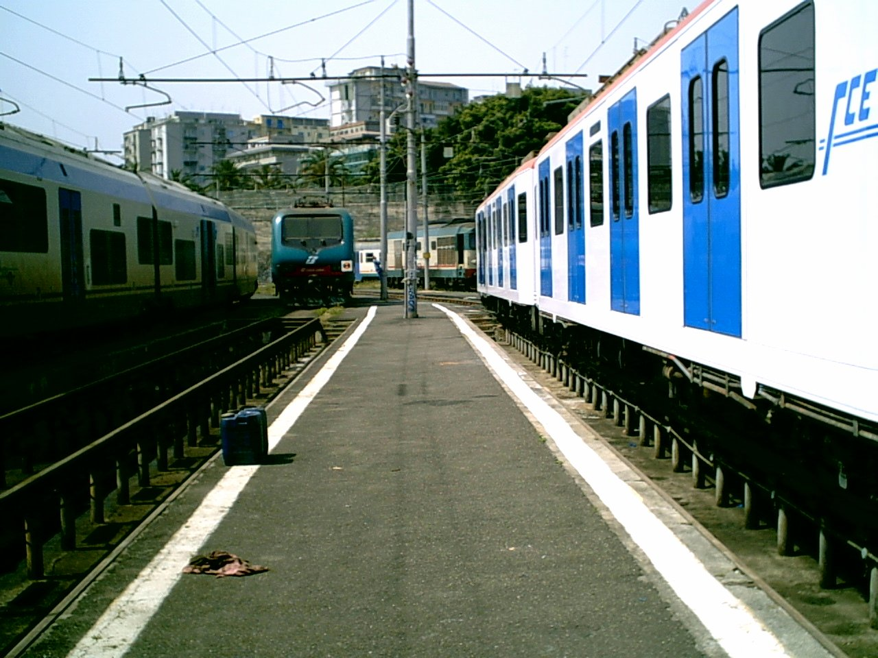 Foto di locomotive